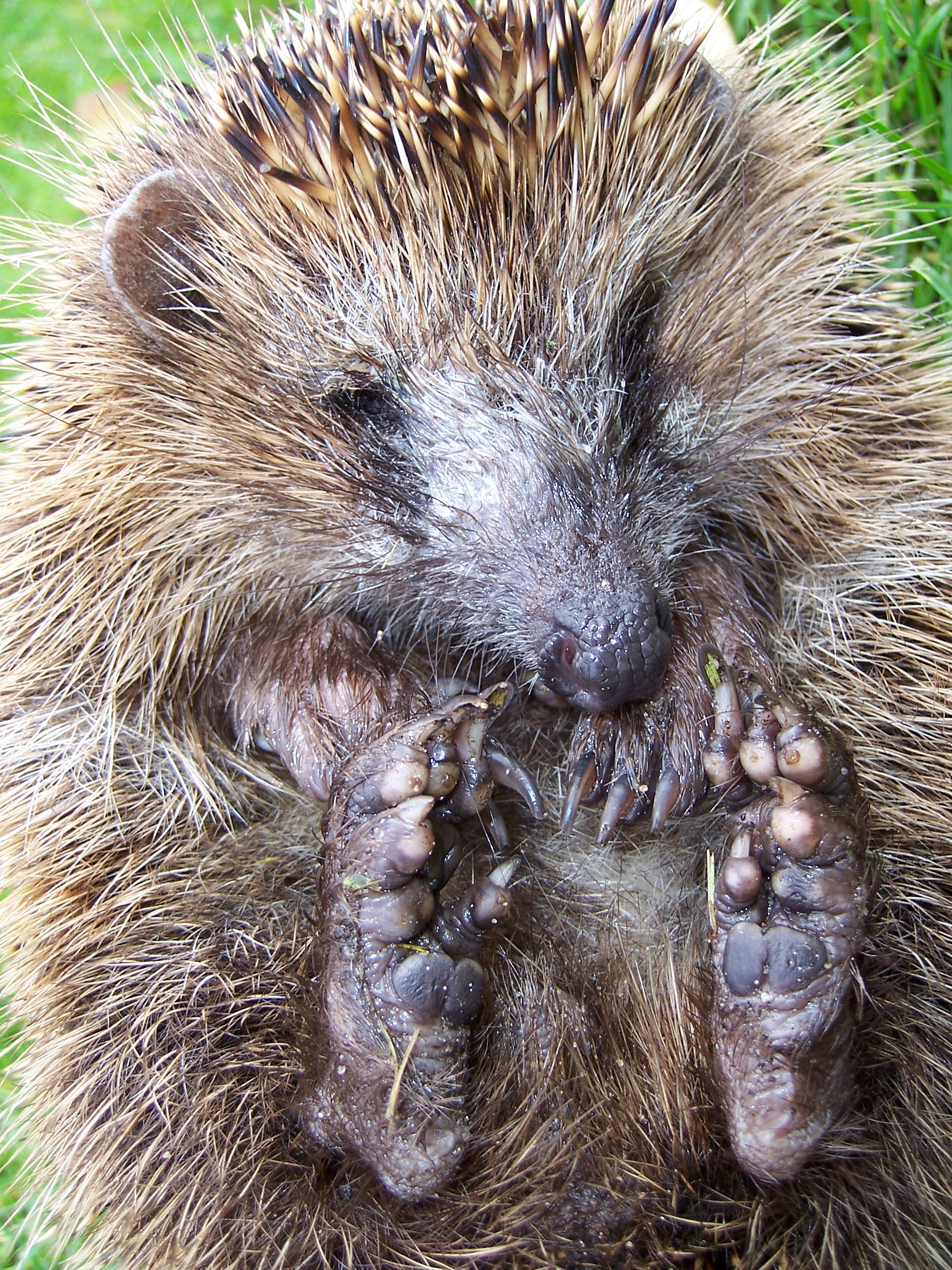 Stacheligel (Erinaceus europaeus) in Bremen, fast ganz eingerollt